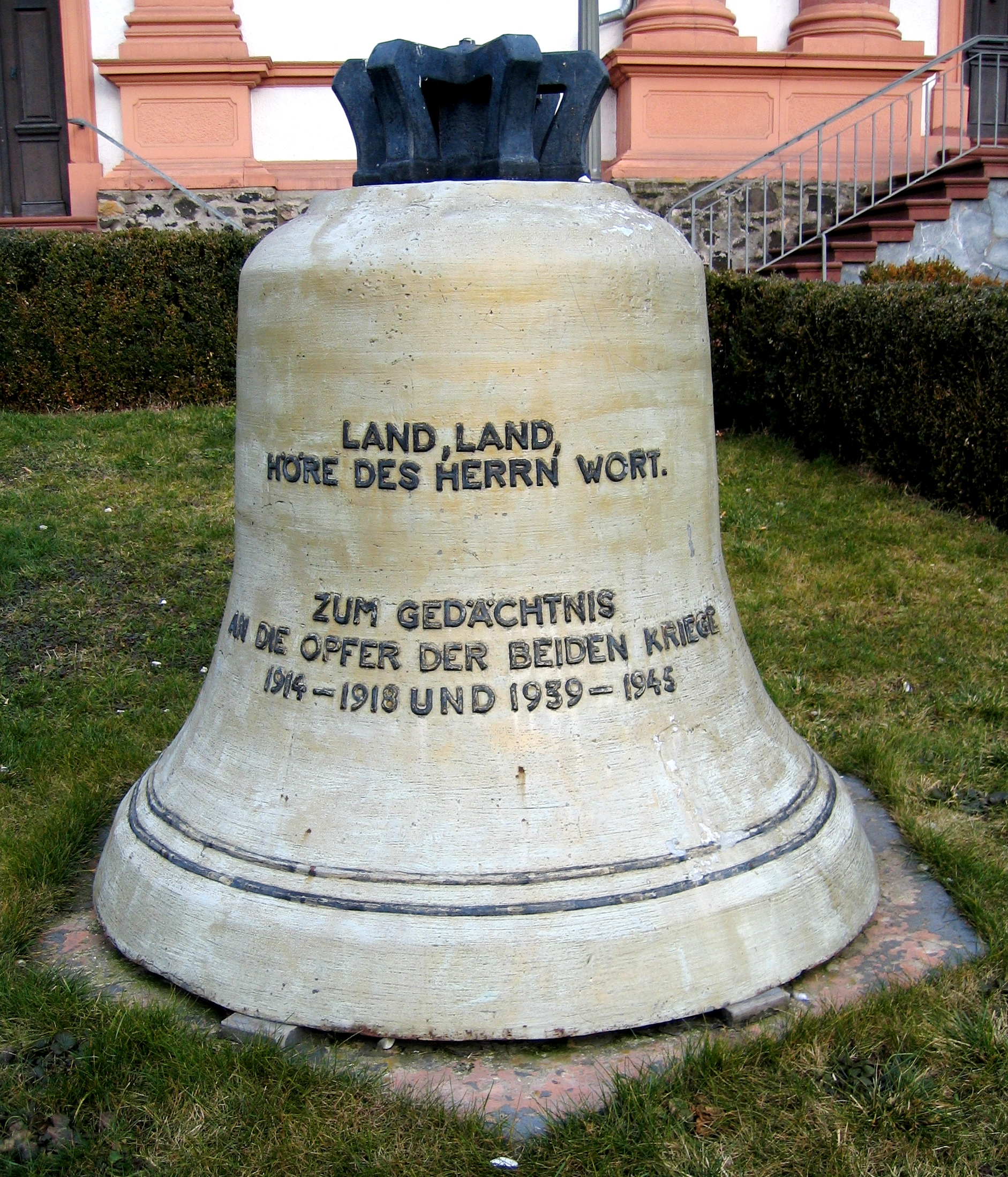 e-Glocke von 1951 auf der Außenanlage der Evangelisch-reformierten Kirche in Wölfersheim.